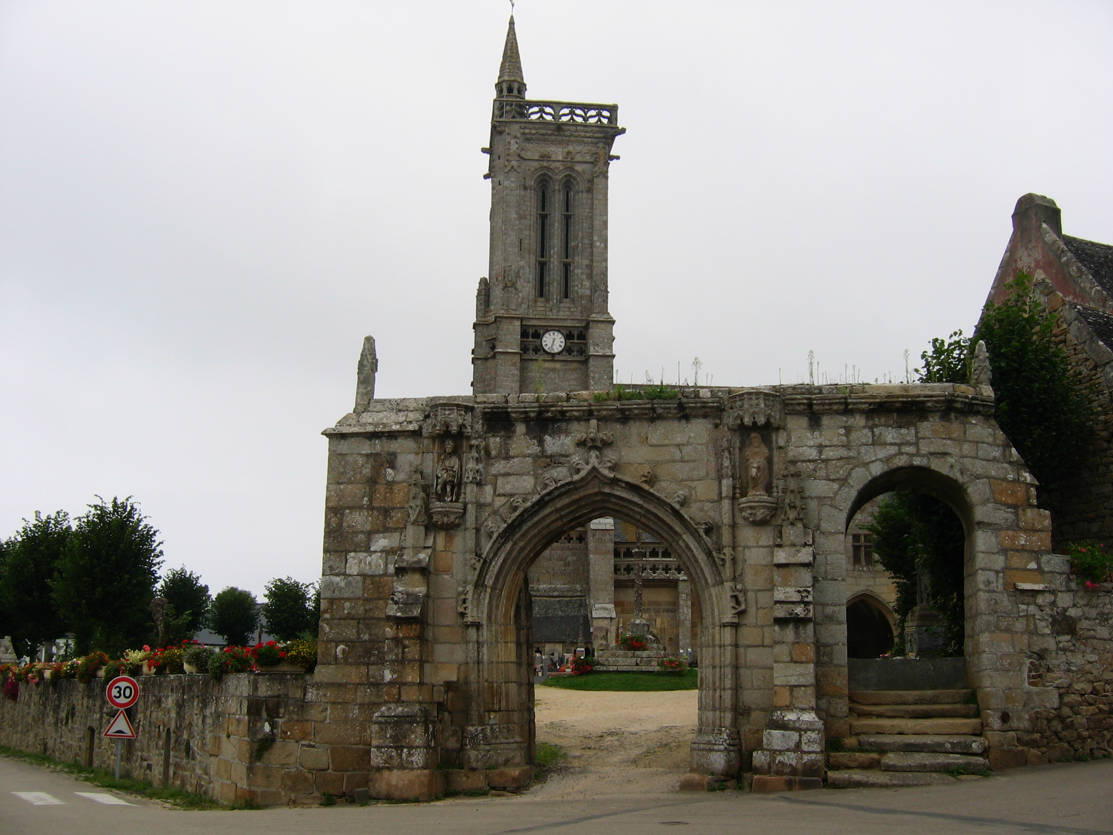 Eglise de saint-jean-du-doigt, prise en septembre 2005 par mes soins.